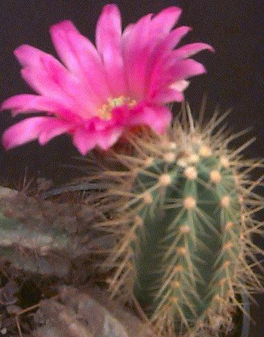 Echinocereus viereckii